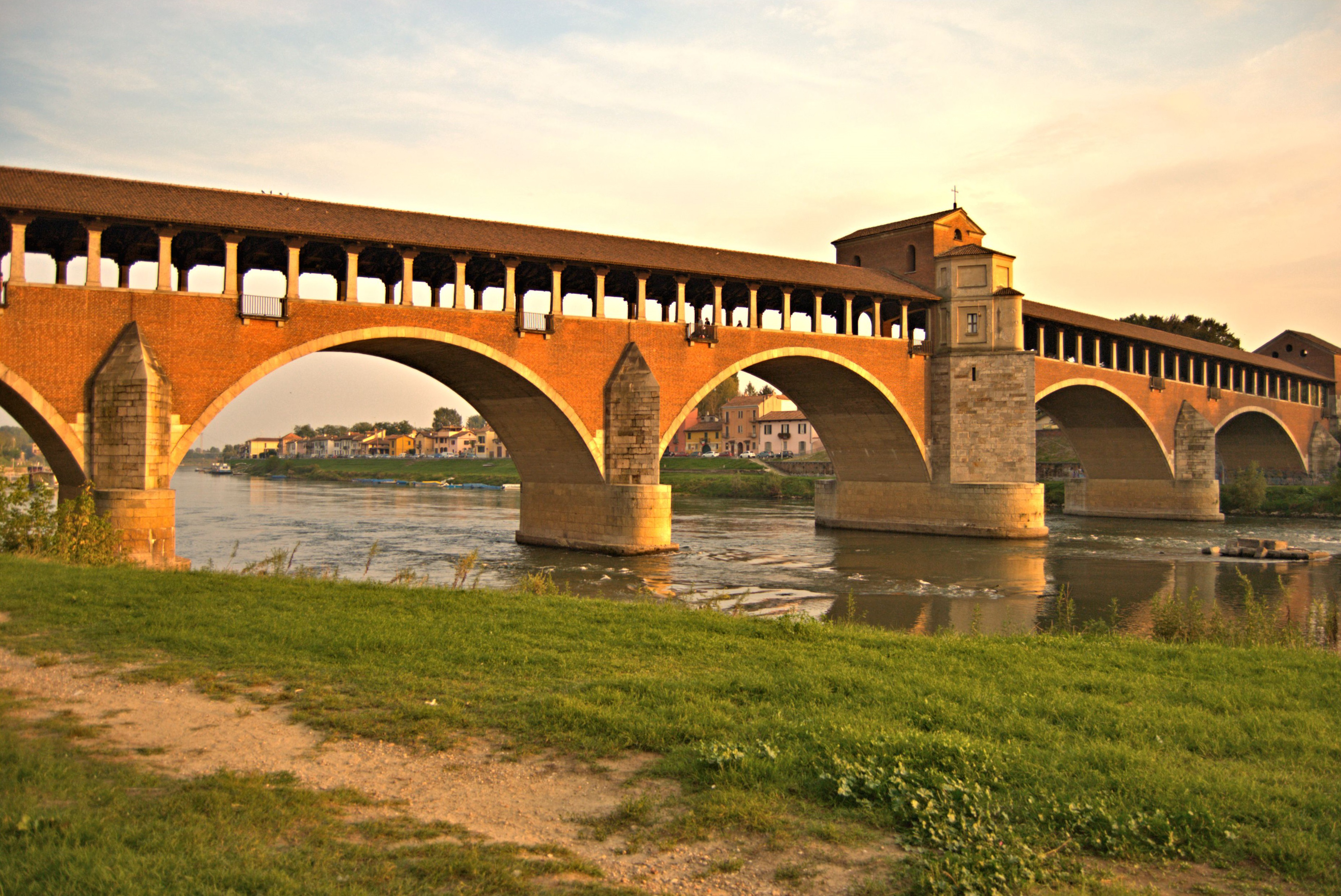 Ponte Coperto This is a photo of a monument which is part of cultural heritage of Italy.